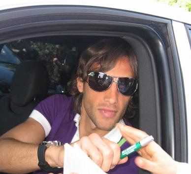 foto tomada a la salida del entrenamiento de Lazio en Formello